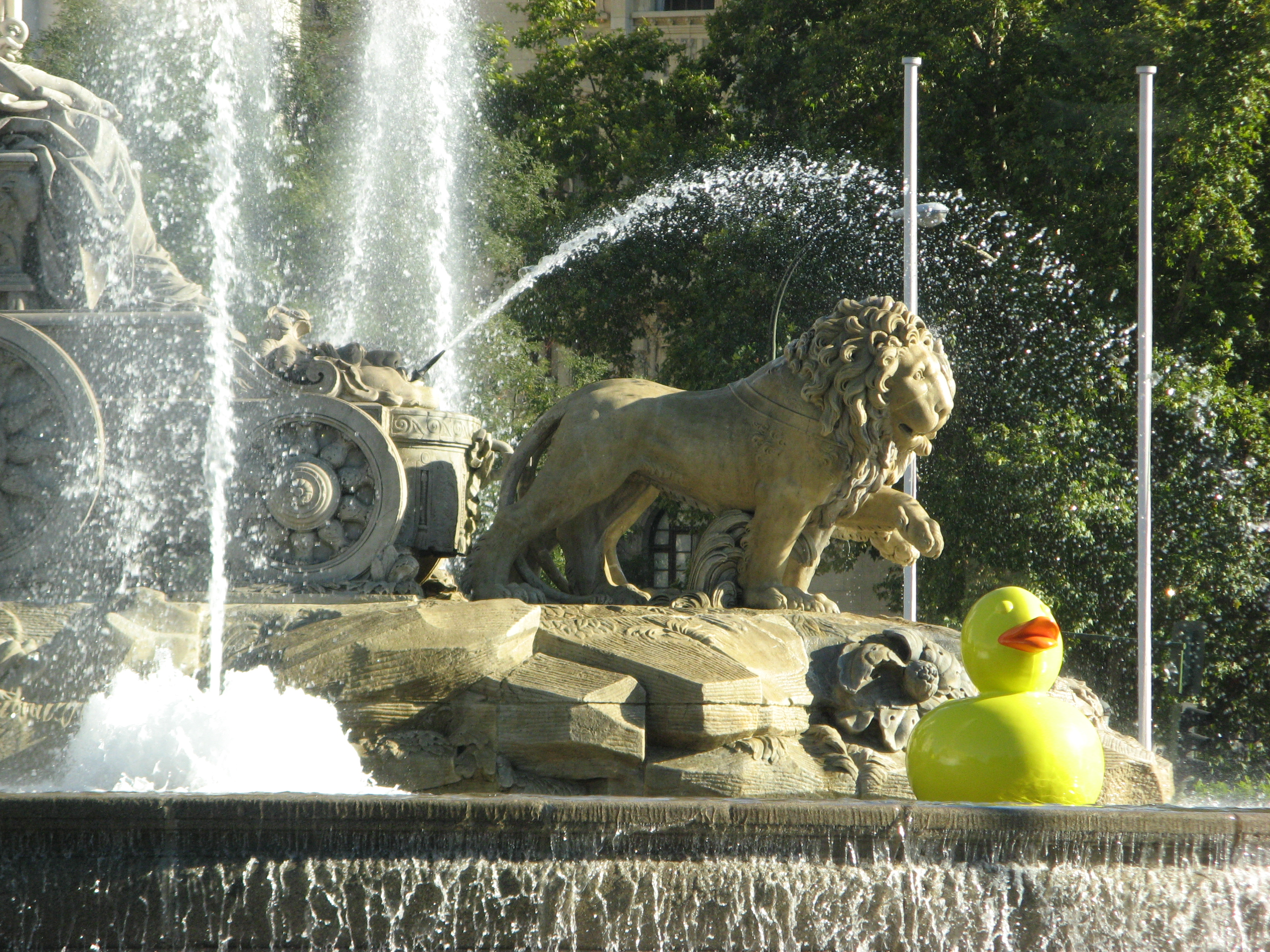 la hora del baño (sesión de tarde)